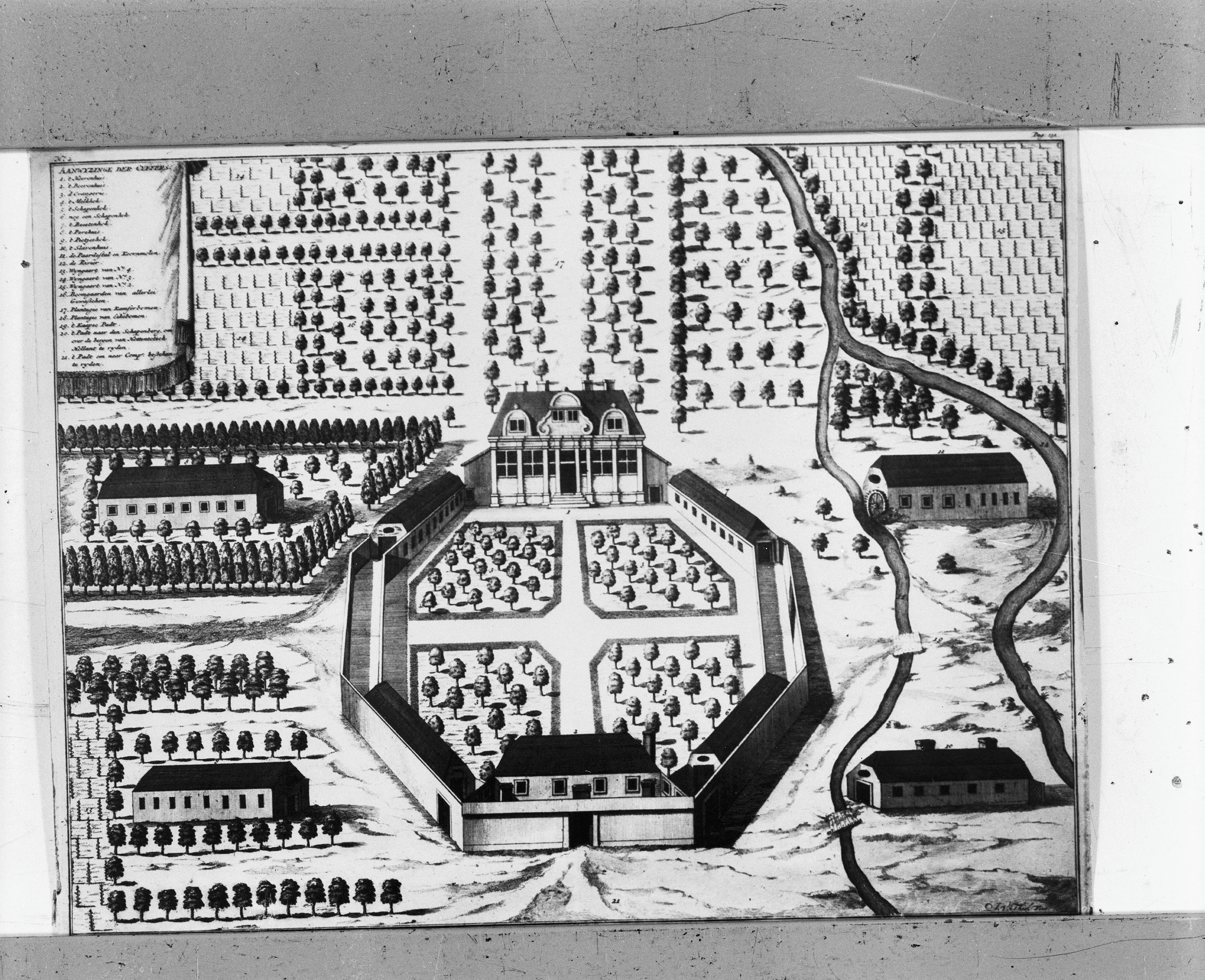 Diversen: Hottentots Holland, "Vergelegen", tekening